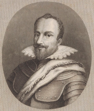 Retrato de Daniel d´Hertaing, señor de Marquette, último gobernador de Ostende durante el asedio de 1601 - 1604.